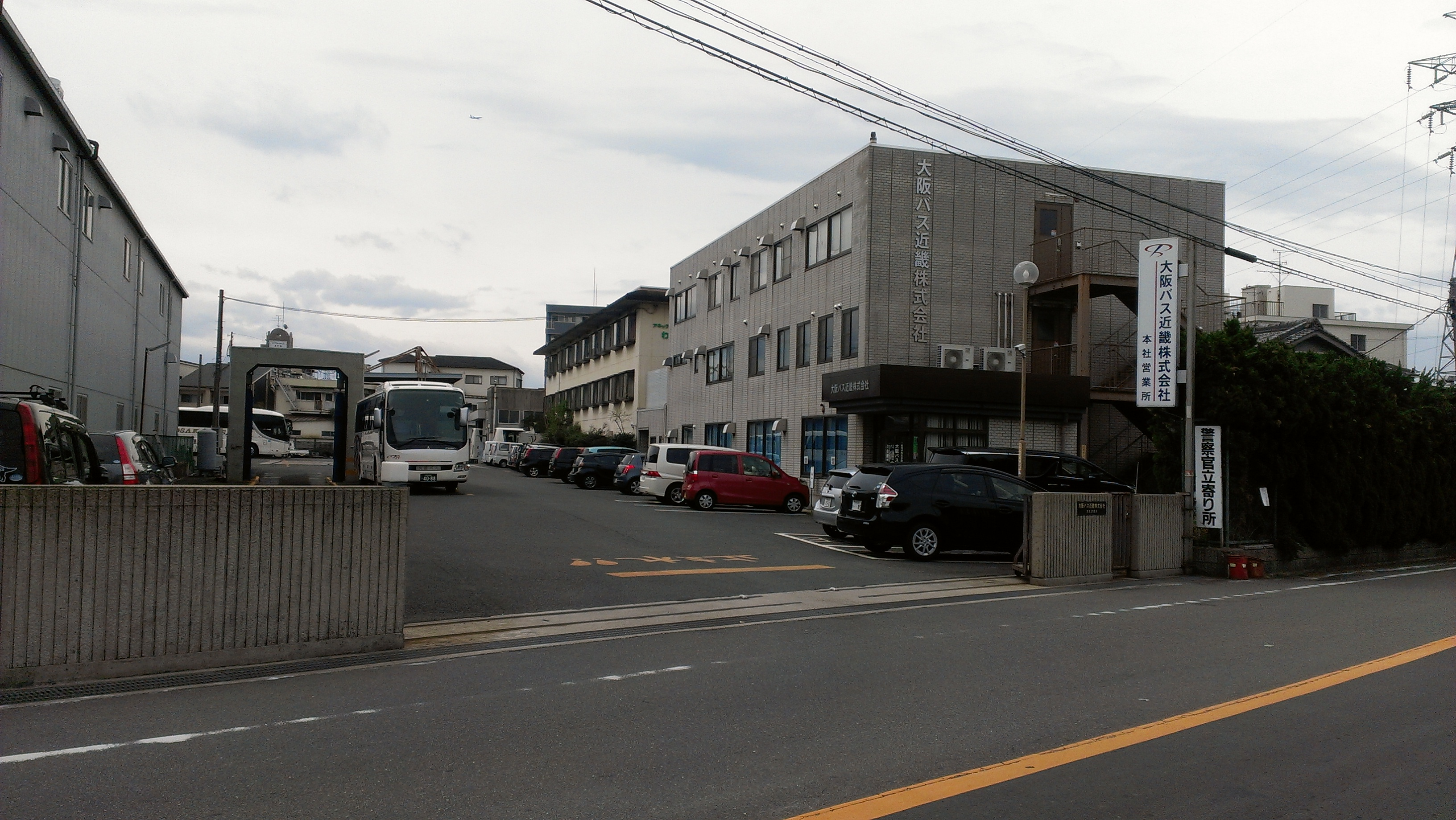 大阪バス近畿本社営業所